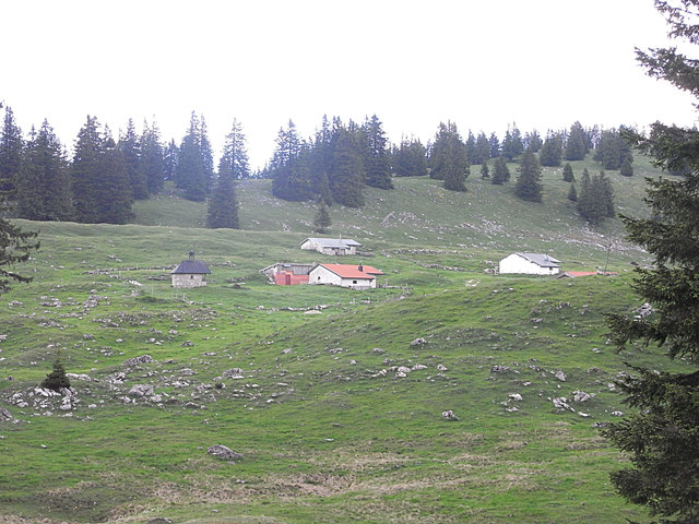 Riesenalm am Riesenberg